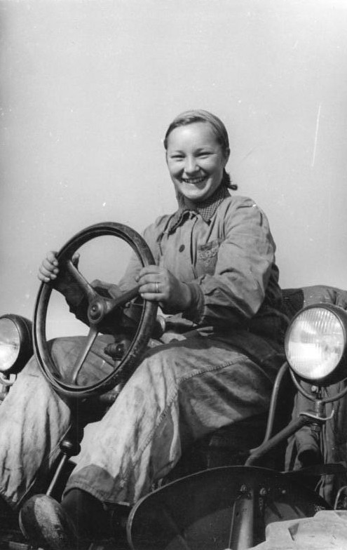 Zentralbild-TBD (Wittig) ,14.10.1953 Die jüngste Traktoristin der MTS Weißensee. Dass die Frauen auch in nicht alltäglichen Berufen ihren "Mann" stellen, beweist täglich die jüngste Traktoristin der MTS Weißensee, Bez. Erfurt, die 16jährige Elfreide Winkler. UBz: Die Traktoristin Elfriede Winkler auf dem sowjetischen Kleintraktor XTZ 7."